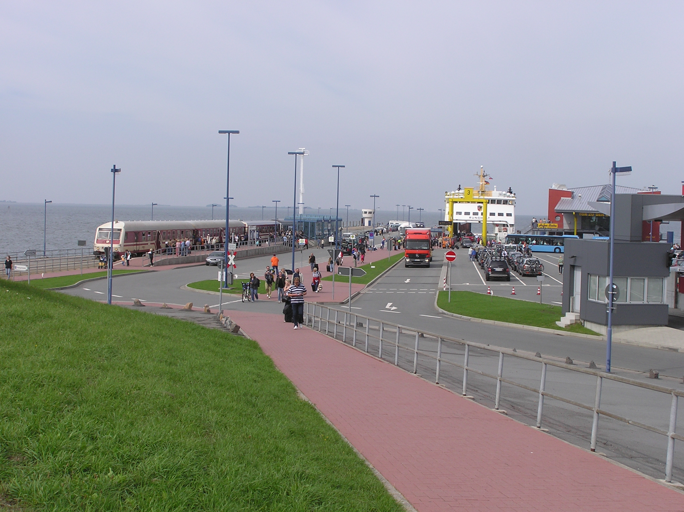 Fährhafen und Bahnhof